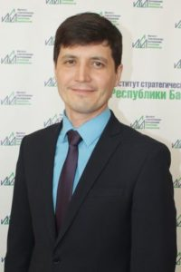 Башҡортса: Йәнгиров Азат Вәзир улы